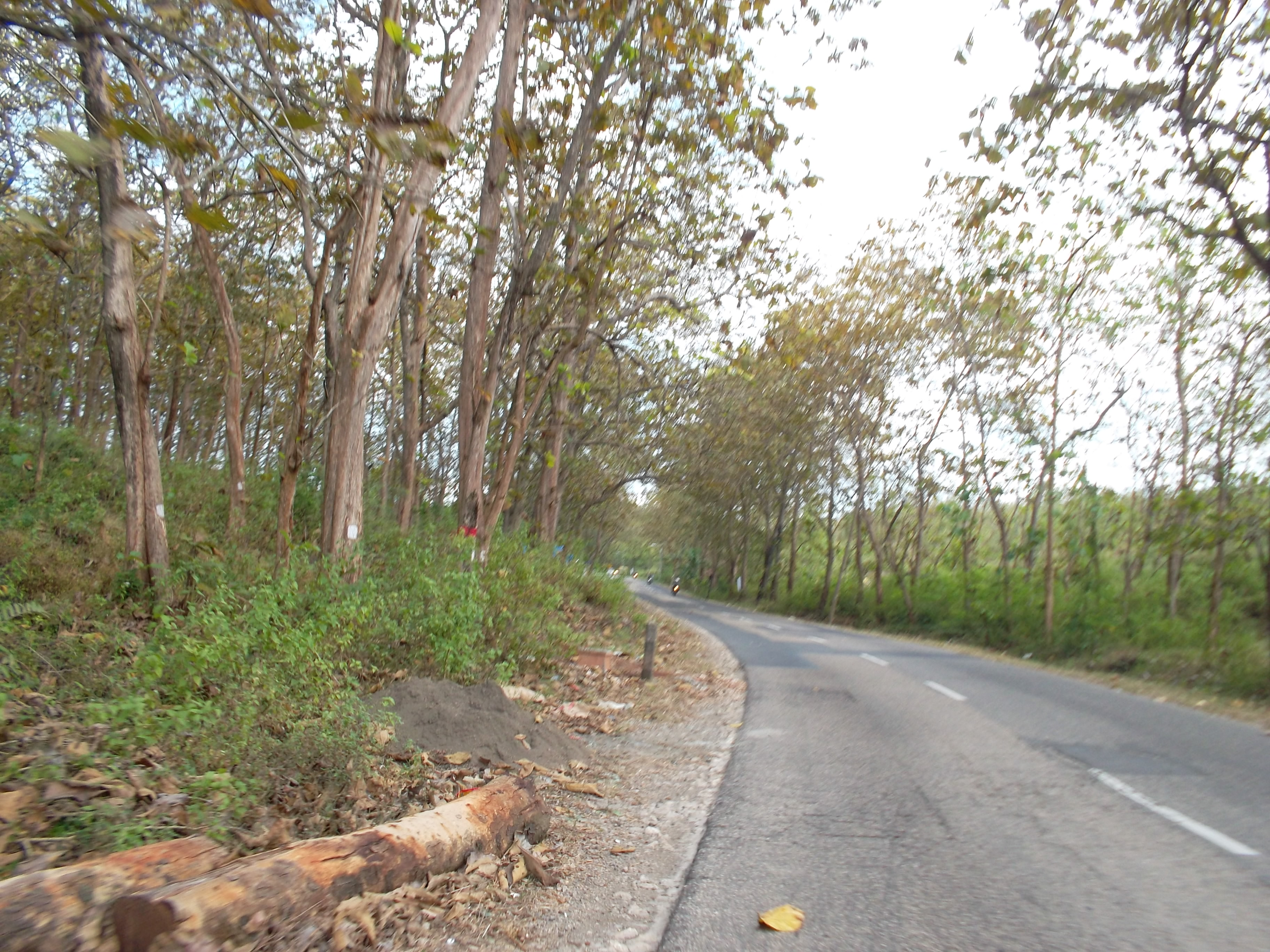 HUTAN JATI GUNUNG GIGIR